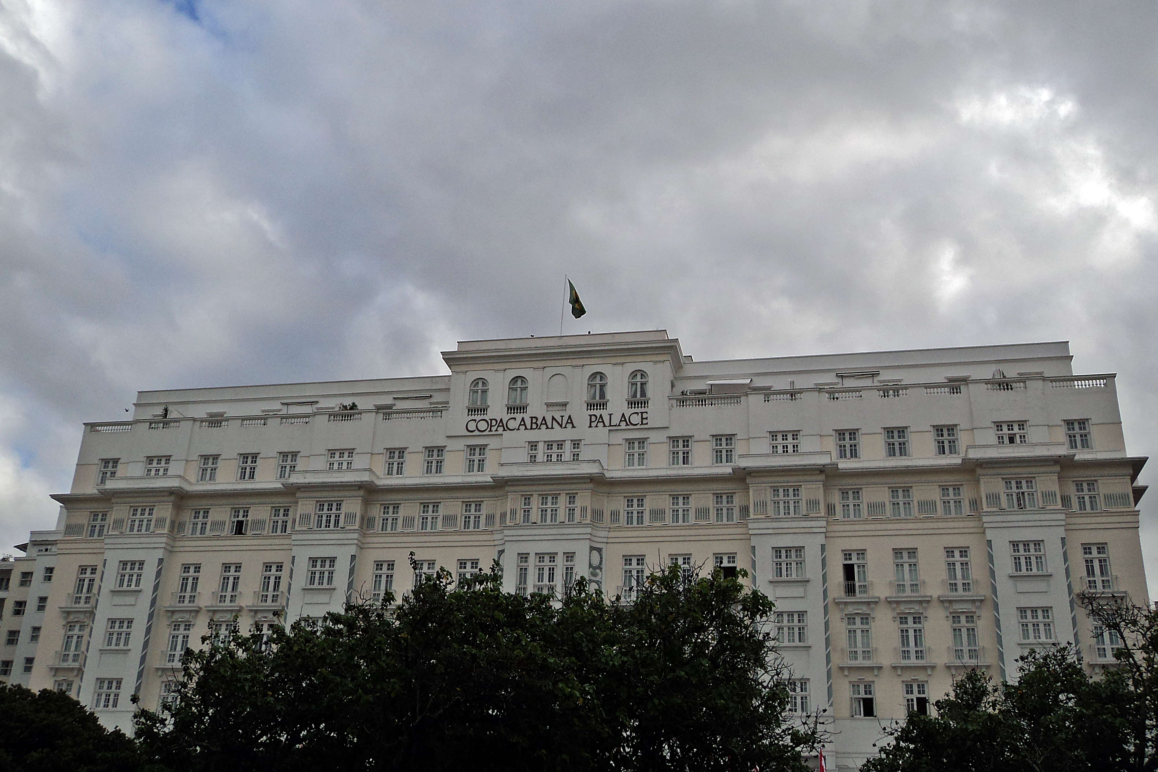 Copacabana Palace Hotel: prédio